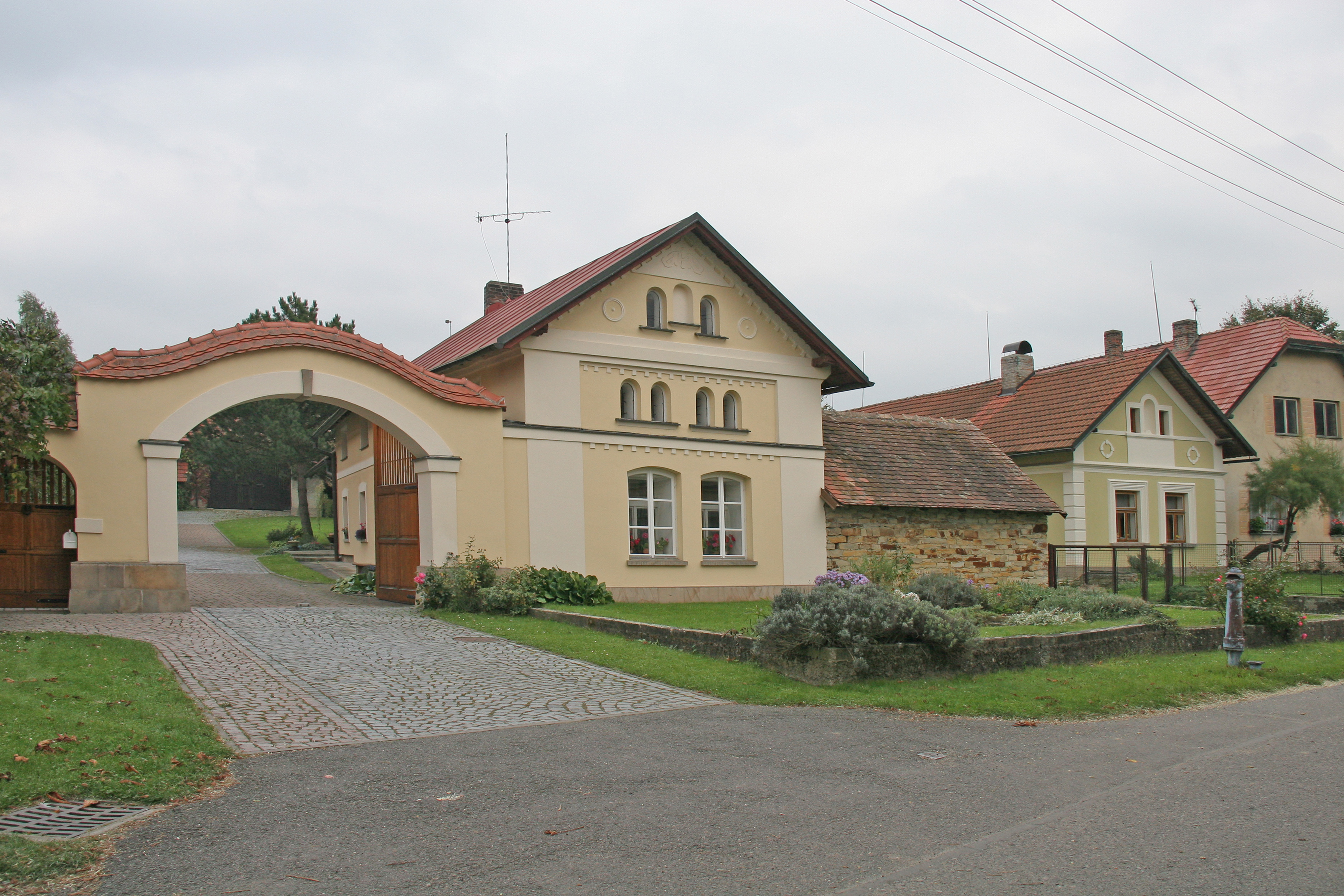 Očelice 3